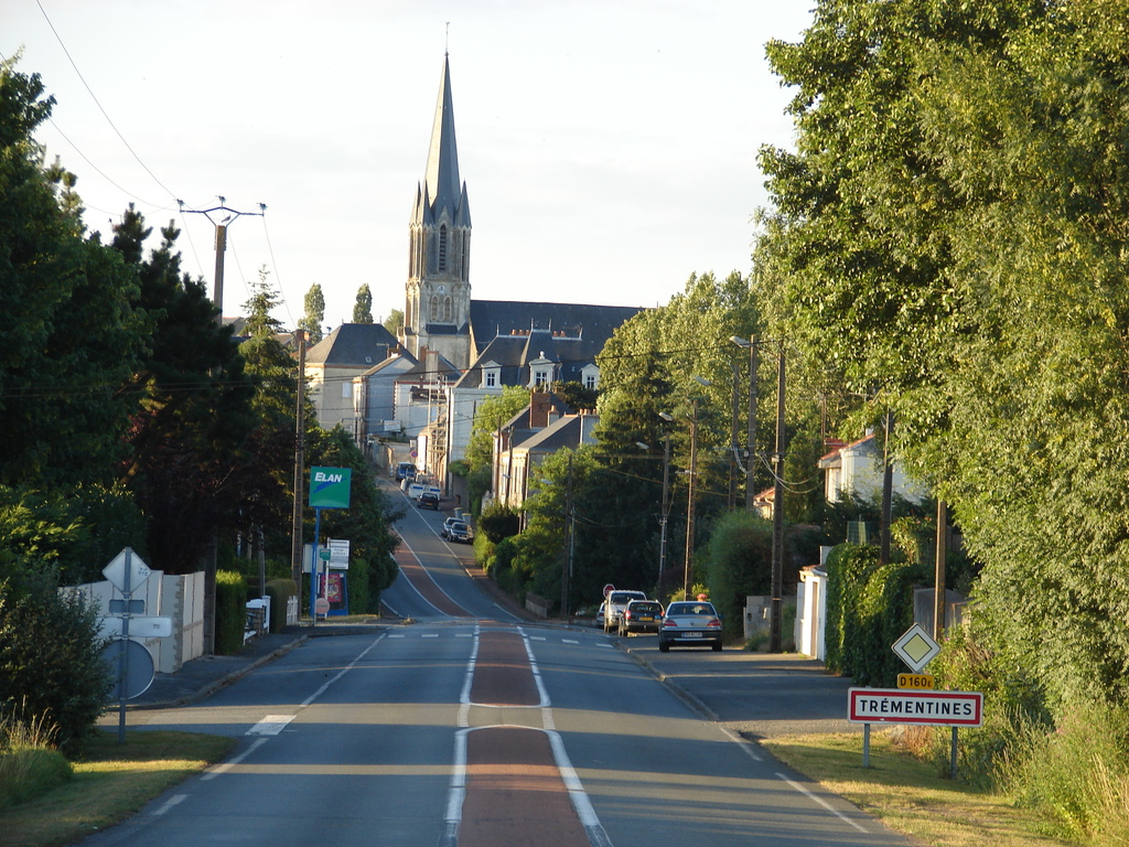 La rue pasteur à Trémentines (Maine-et-Loire, France).